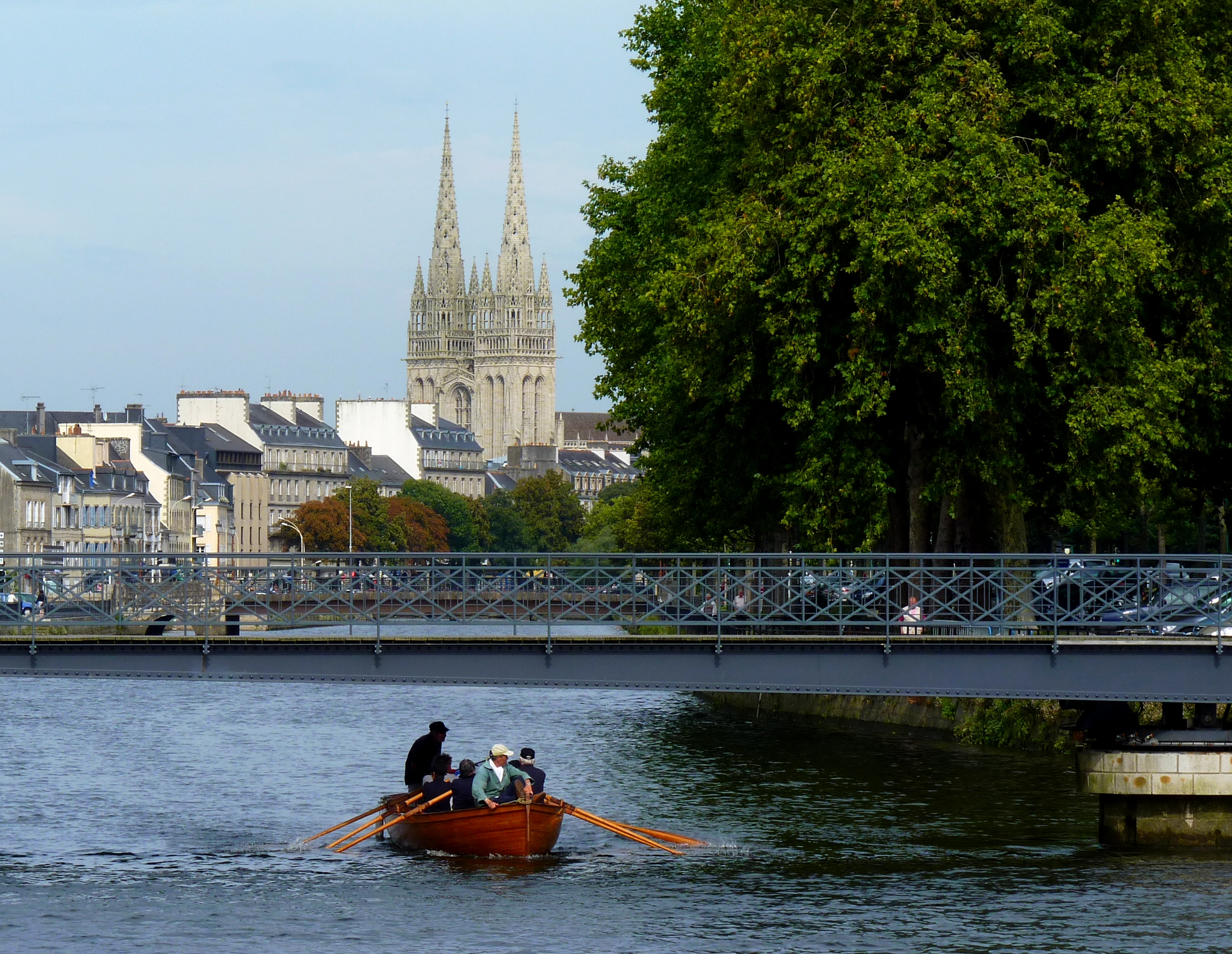 Rivière de l'odet à Quimper